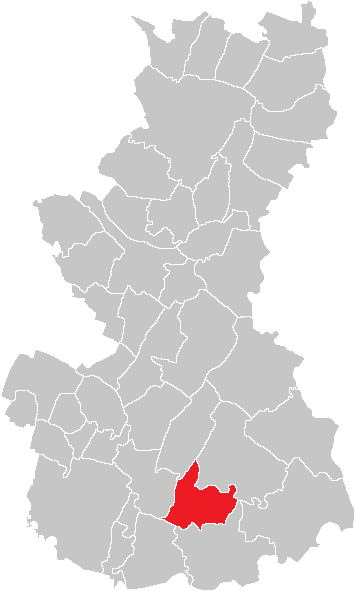 Bezirk Gänserndorf